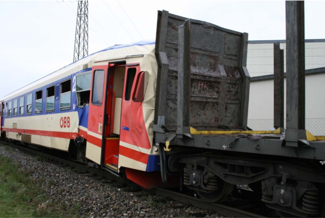 Kollision in Wieselburg